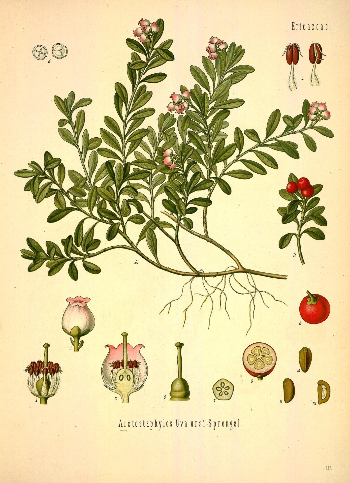 Bärentraube. A blühende Pflanze, nat. Grösse; B Fruchtzweig, desgl.; 1 Blüthe, vergrössert; 2 dieselbe im Längsschnitt, desgl.; 3 dieselbe ohne Krone, desgl.; 4 Staubgefässe, desgl.; 5 Pollen, desgl.; 6 Stempel, desgl.; 7 Fruchtknoten im Querschnitt, desgl.; 8 Frucht, desgl.; 9 dieselbe im Querschnitt, desgl.; 10 u. 11 Steinkern, von verschiedenen Seiten, desgl.; 12 derselbe im Längsschnitt, desgl.